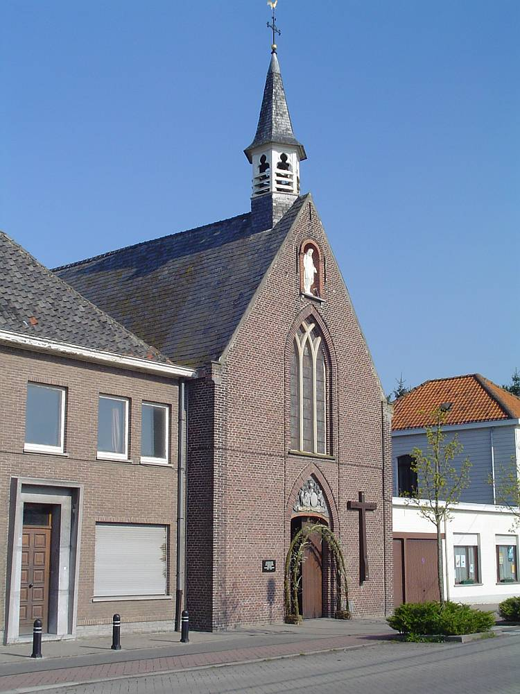 De Onze-Lieve-Vrouwkerk in Drongen Luchteren